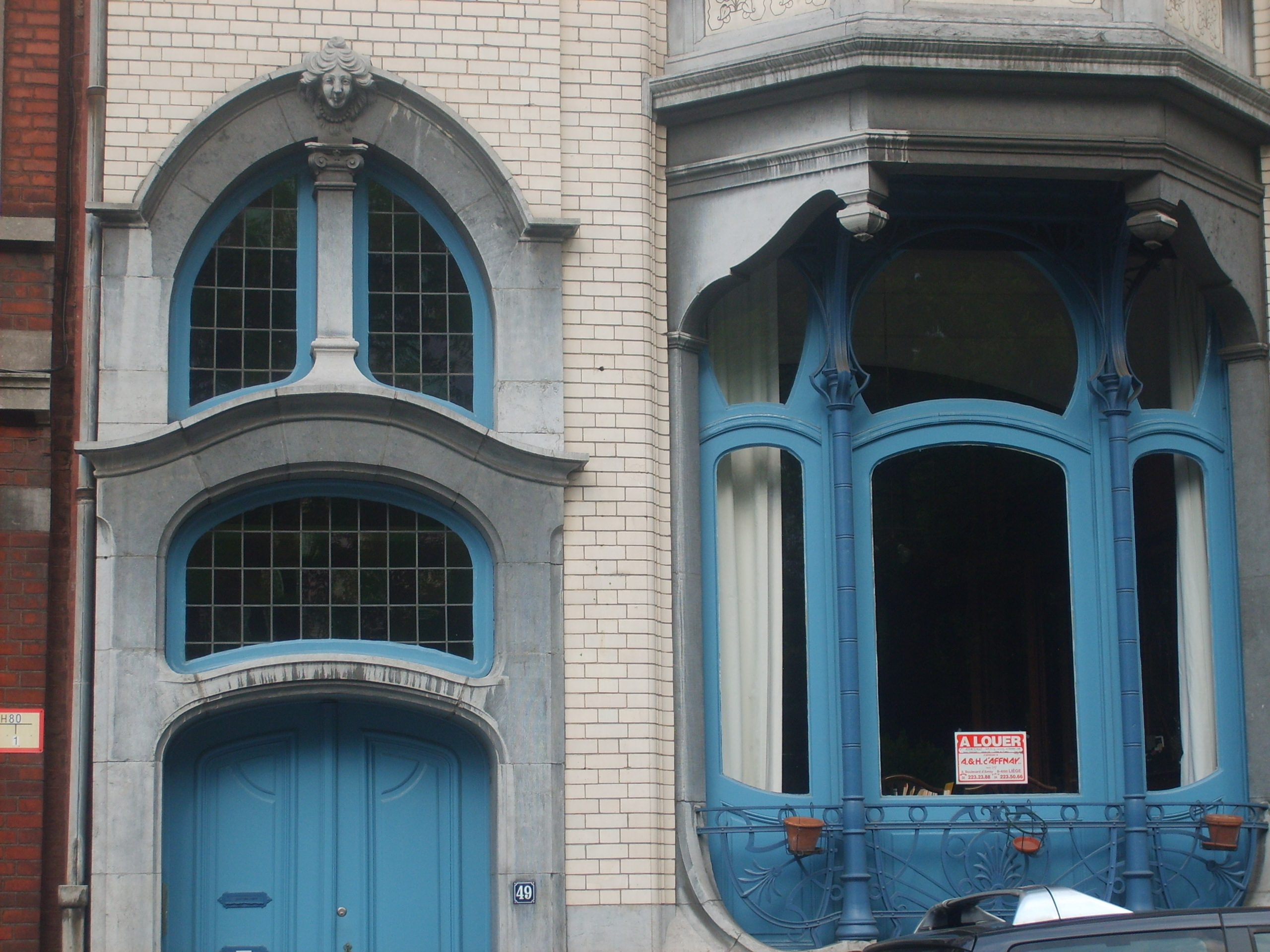 Maison Brasseur-Bodson Rue du Parc, 49 Liège